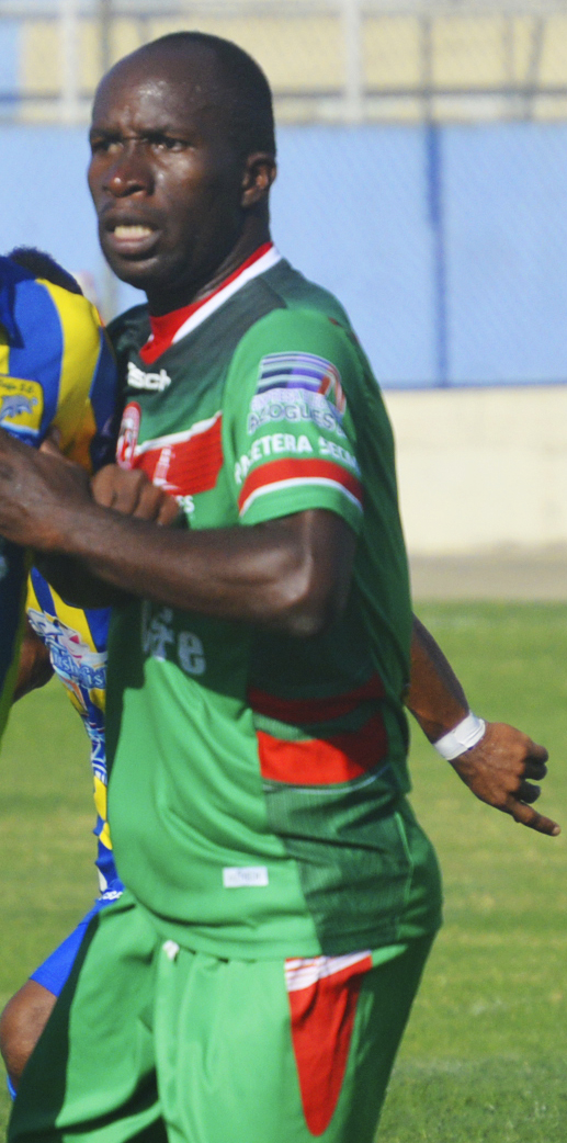 Franklin Corozo jugando para Deportivo Azogues en el 2014